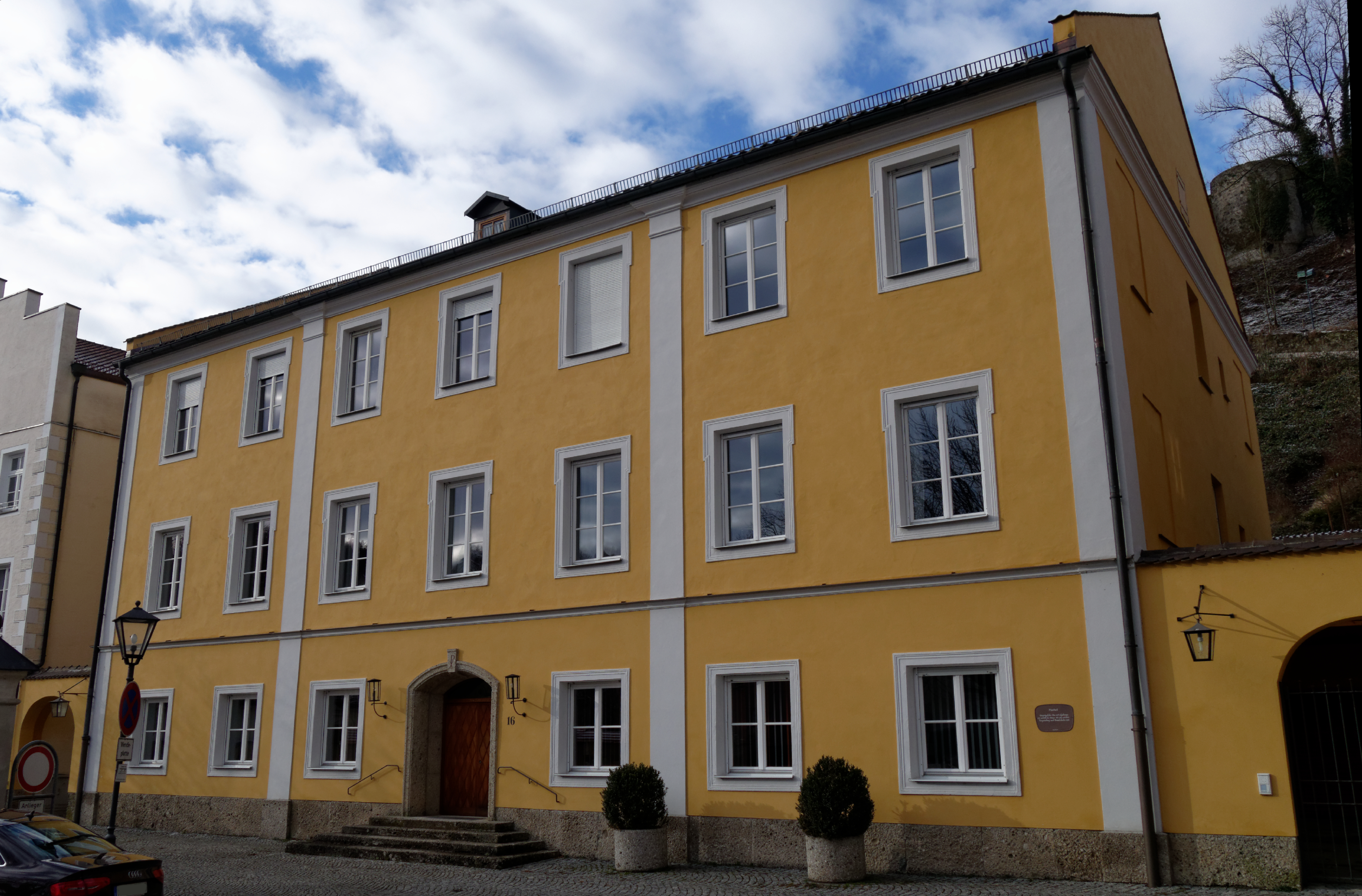 Pfarrhof in der Messerzeile 16